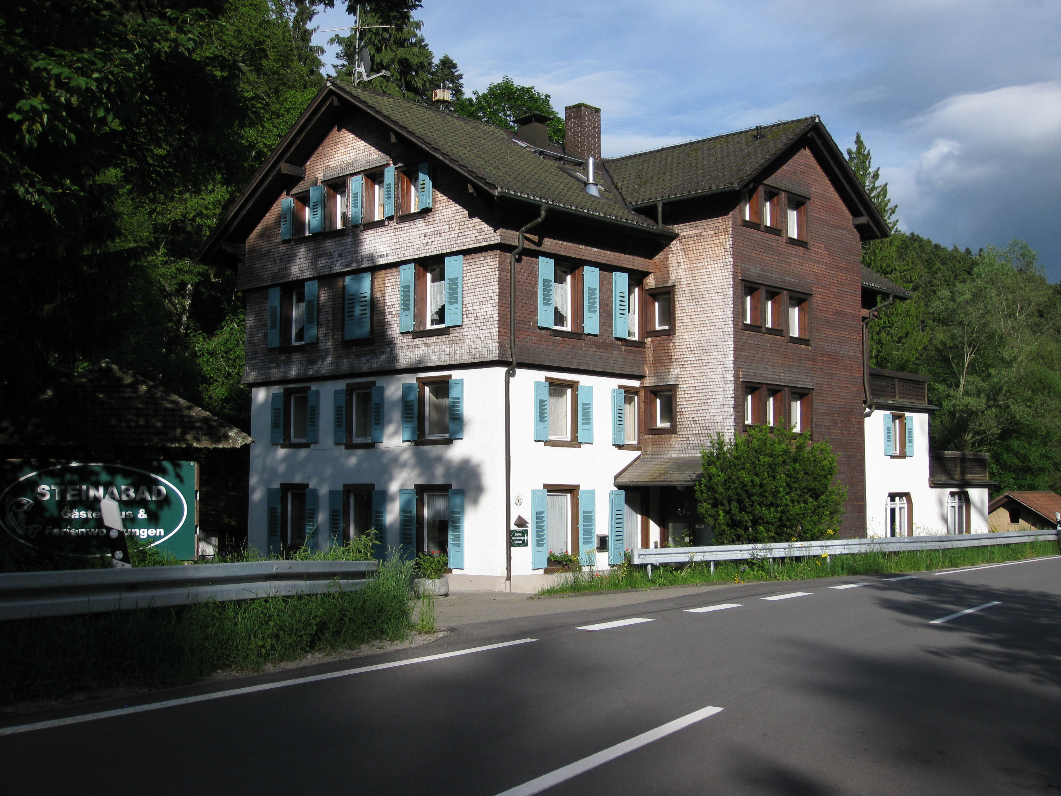 Das ehemalige Kurbad Steinabad, heute Gästehaus